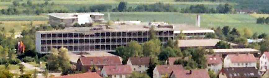 Schickhardt-Gymnasium Herrenberg, Ansicht vom Schlossberg, Sommer 1990